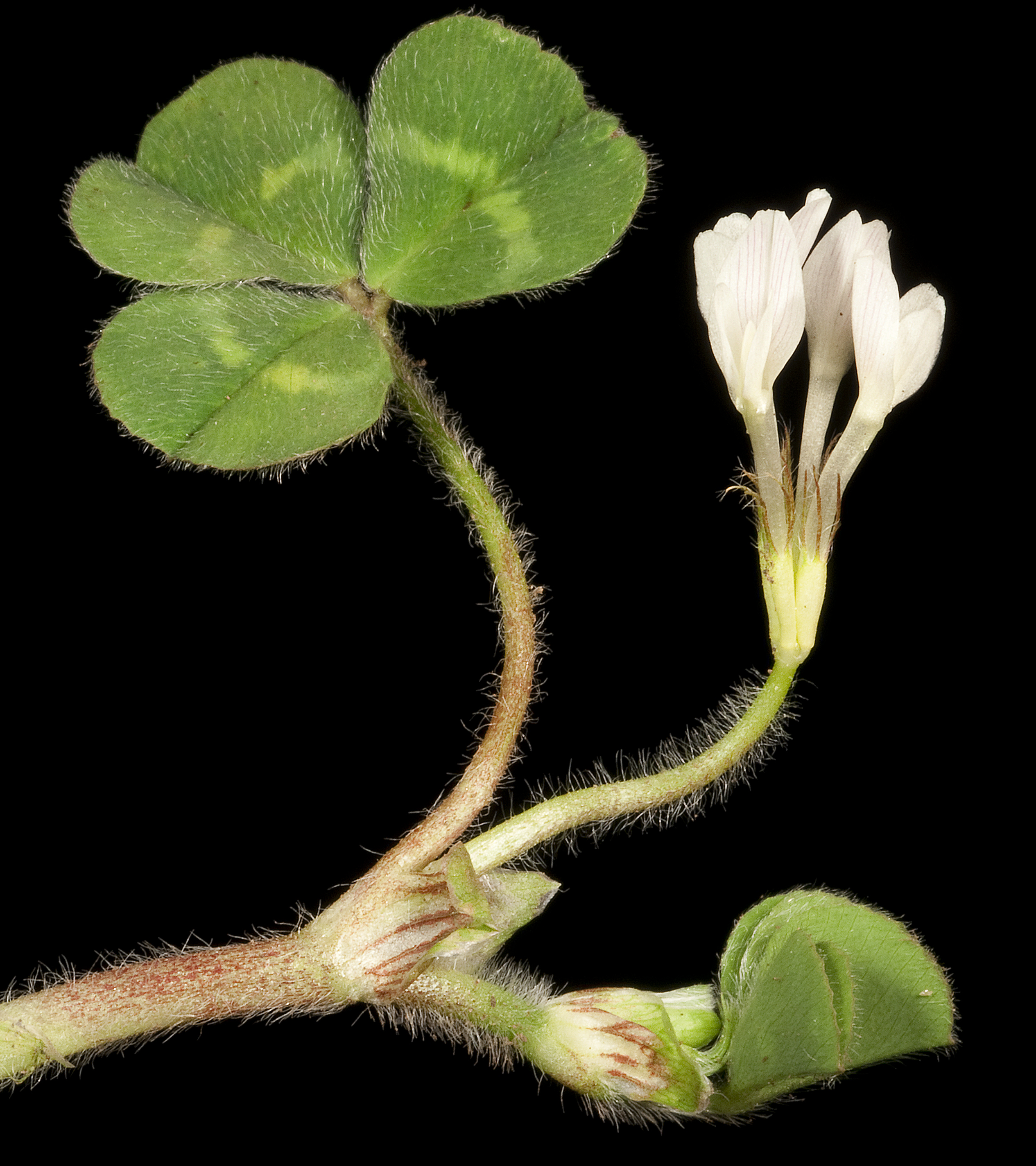 KRT4248